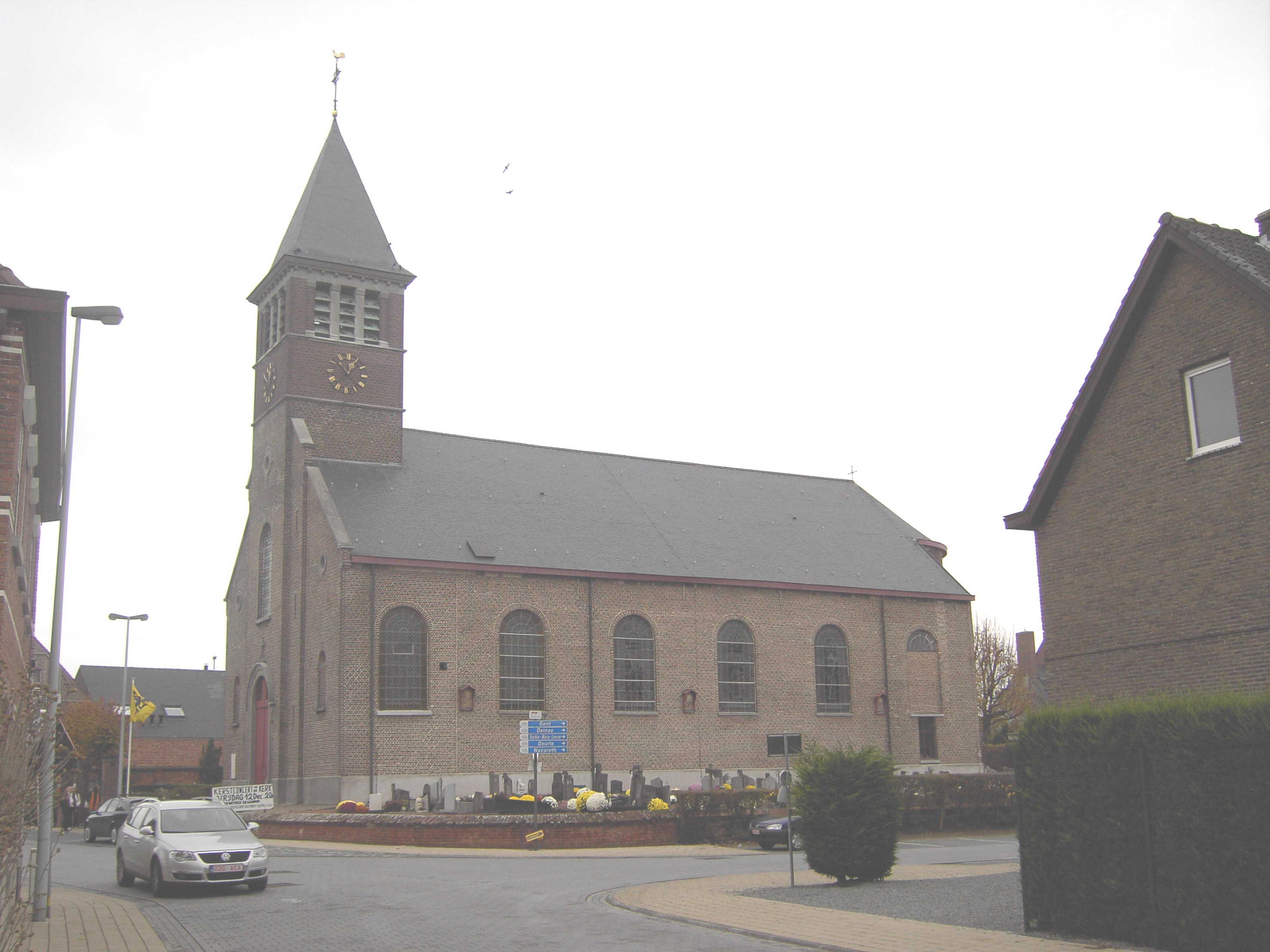 Sint-Amands en Sint-Jobkerk - Astene - Deinze - Oost-Vlaanderen - België